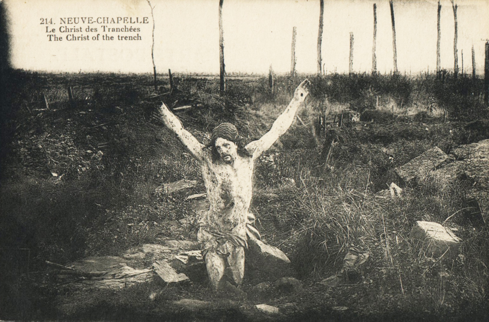 Picard: Crisse-des-tranchées à Neue-Capelle pindant l' Prumière Djérre mondiale.